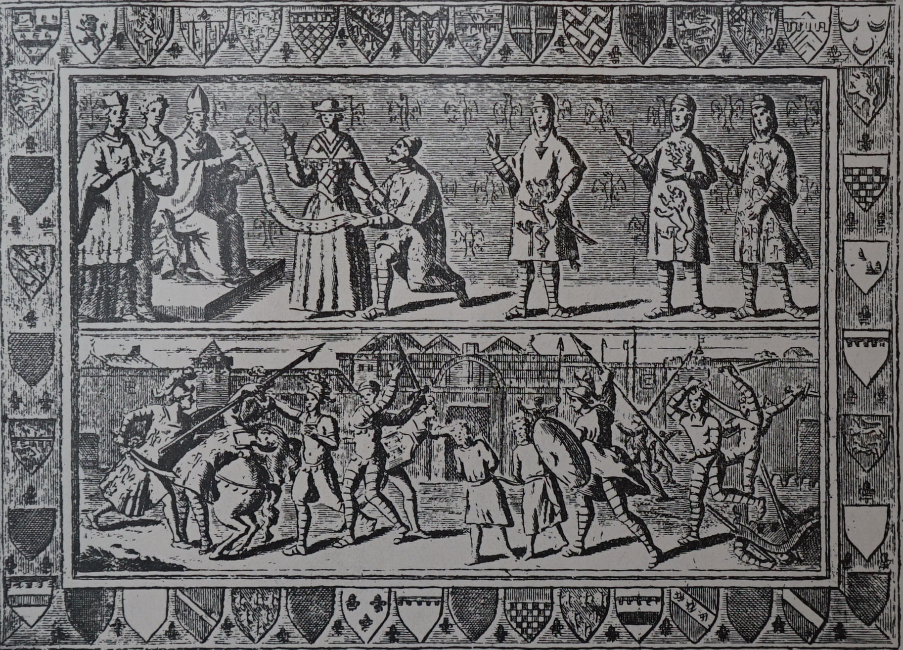 in "société académique de Laon".